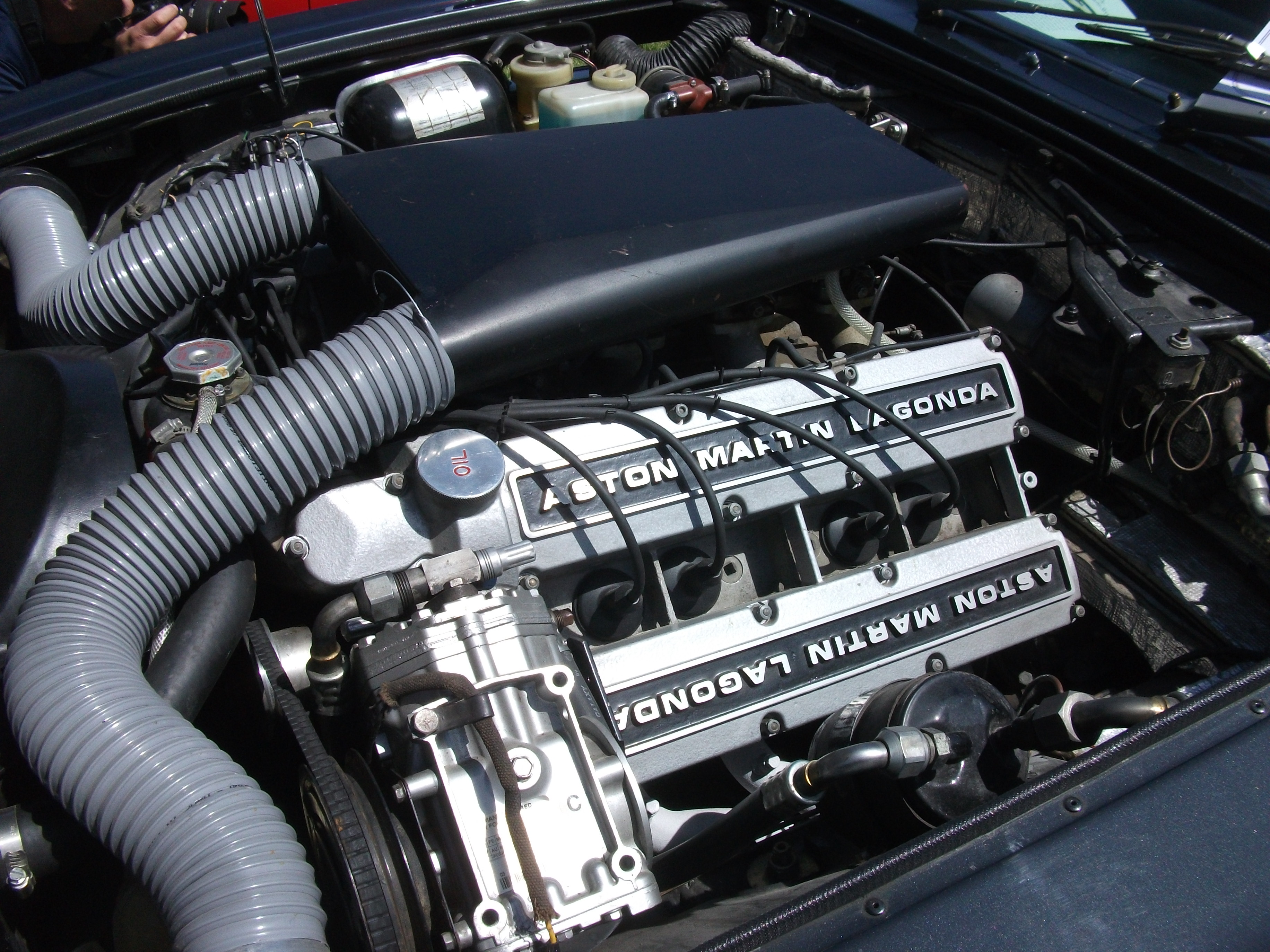 1976 Aston Martin V8 engine